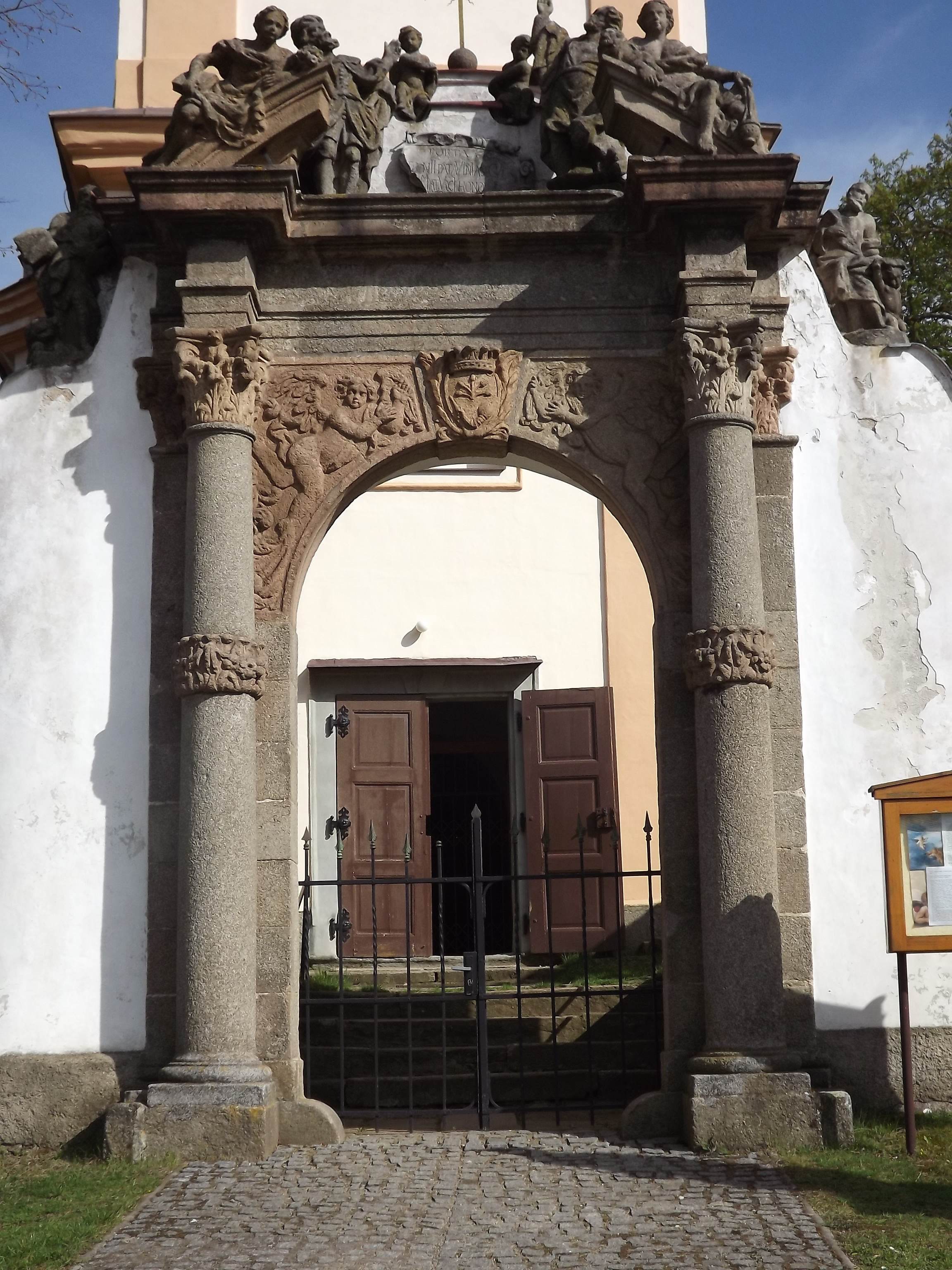 Kostel Nanebevzetí Panny Marie, Pičín, okres Příbram.